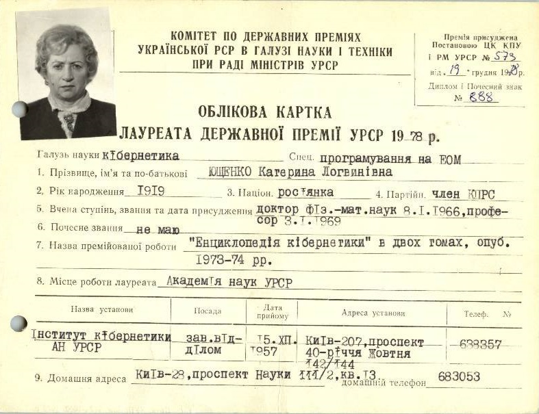 Облікова картка лауреата Державної премії УРСР Ющенко Катерини Логвинівни